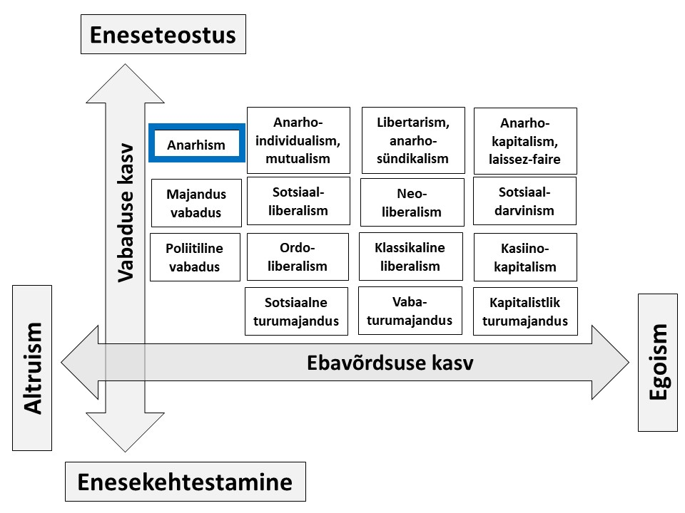 Anarhism sotsiaalse korra mudelis